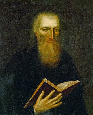 Прп. Зосима (Верховский). Портрет. Кон. 20-х - 30-е гг. XIX в. (ЦИМ СДМ)